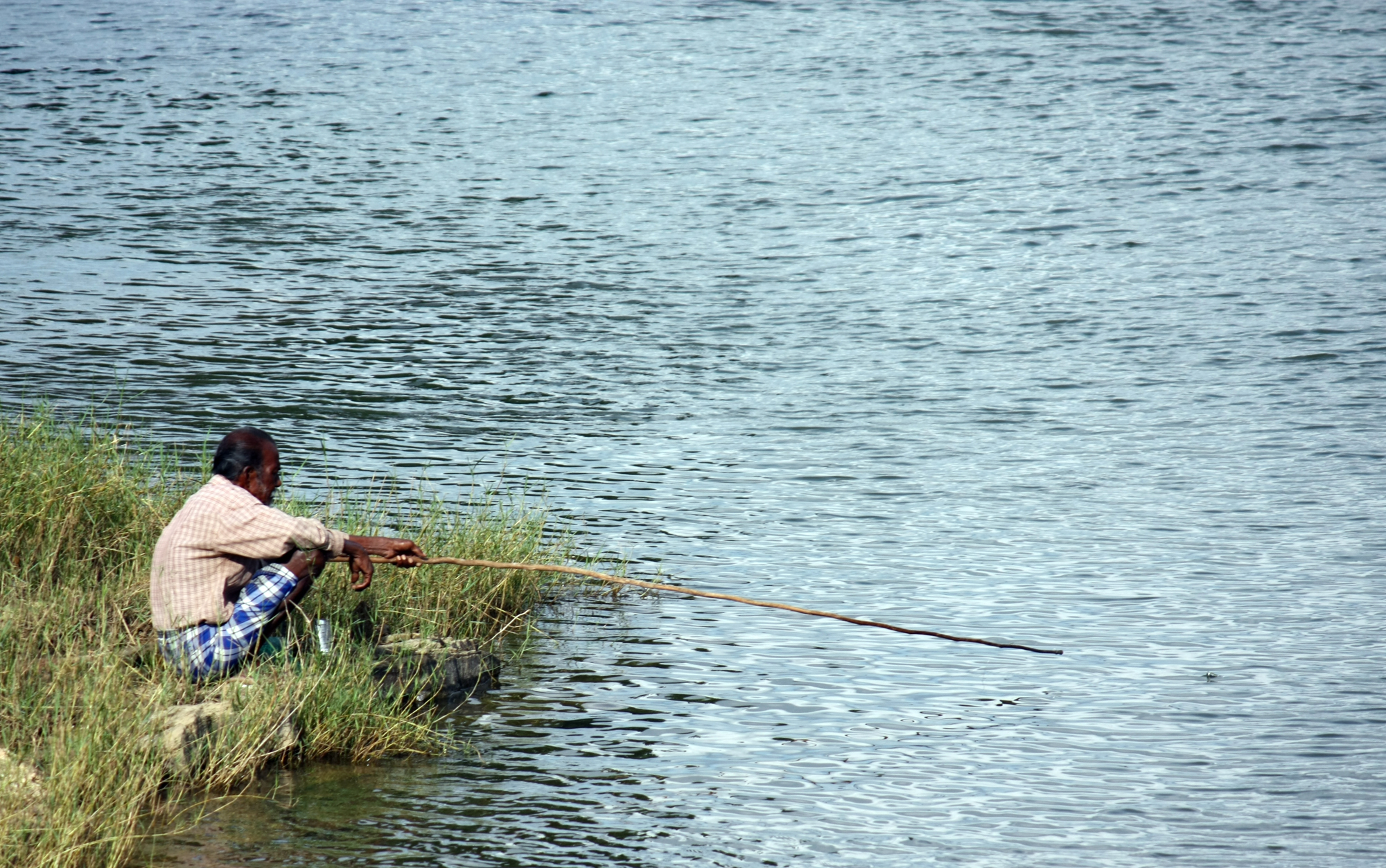 தூண்டில் மூலம் மீன்பிடி - மட்டக்களப்பு